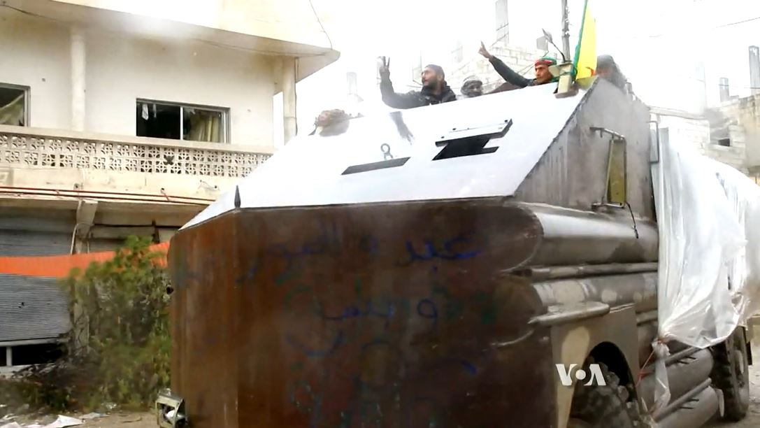 YPG pendant la bataille de Kobané, vers fin janvier 2015.